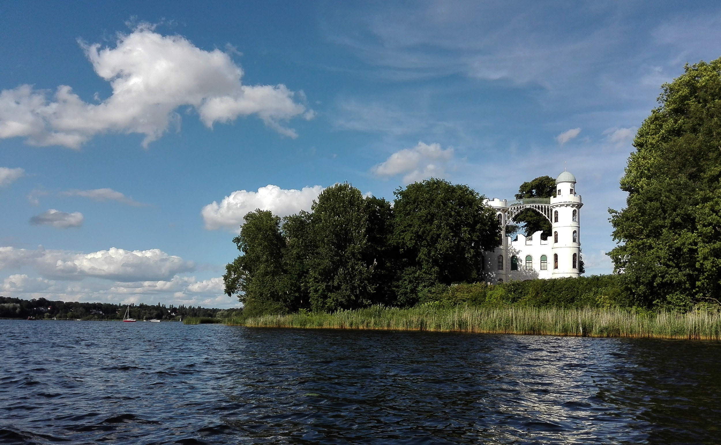 Blick von der Havel auf das Schloss auf der Pfaueninsel in Berlin-Wannsee.This is a photograph of an architectural monument.